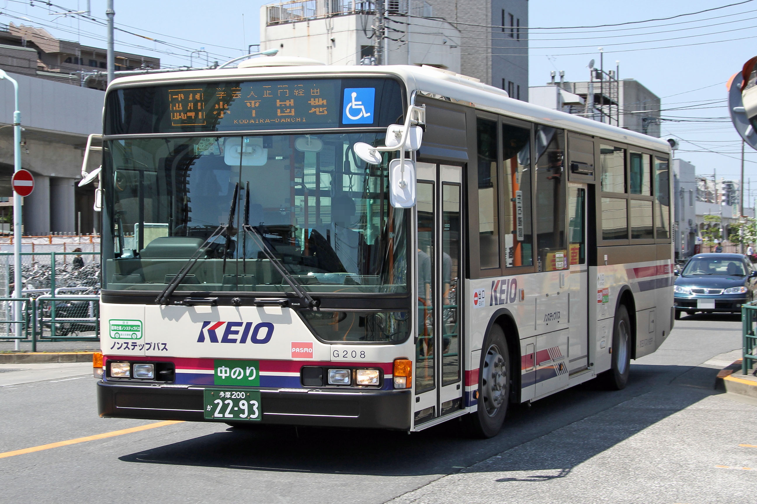 Keio Bus Koganei car 京王バス小金井の車両